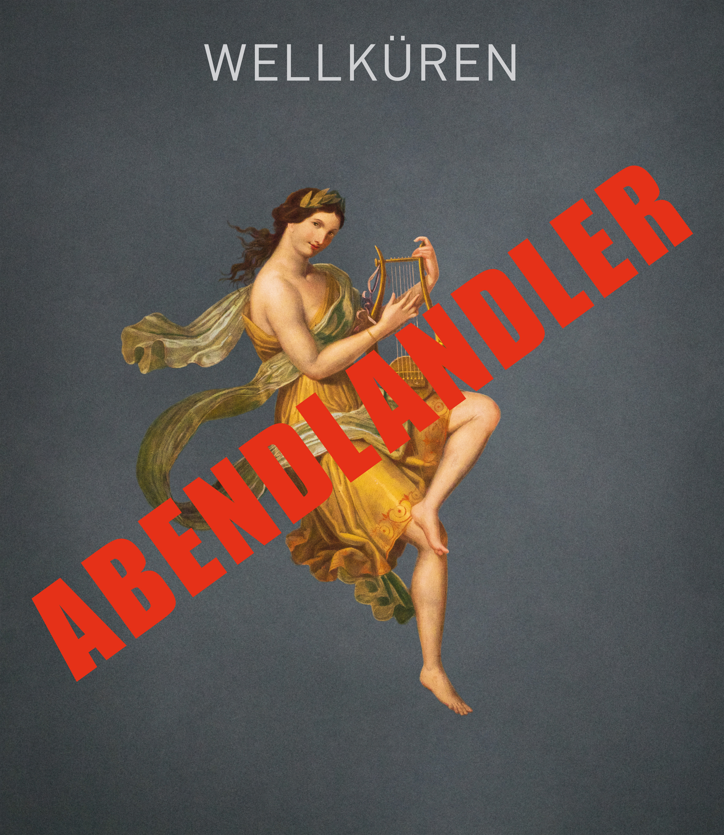 Plakat zum Programm Abendlandler der Wellküren 2018